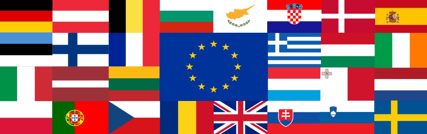 Drapeaux de l'Union européenne avec le drapeau de l'UE au centre (bannière projet UE).